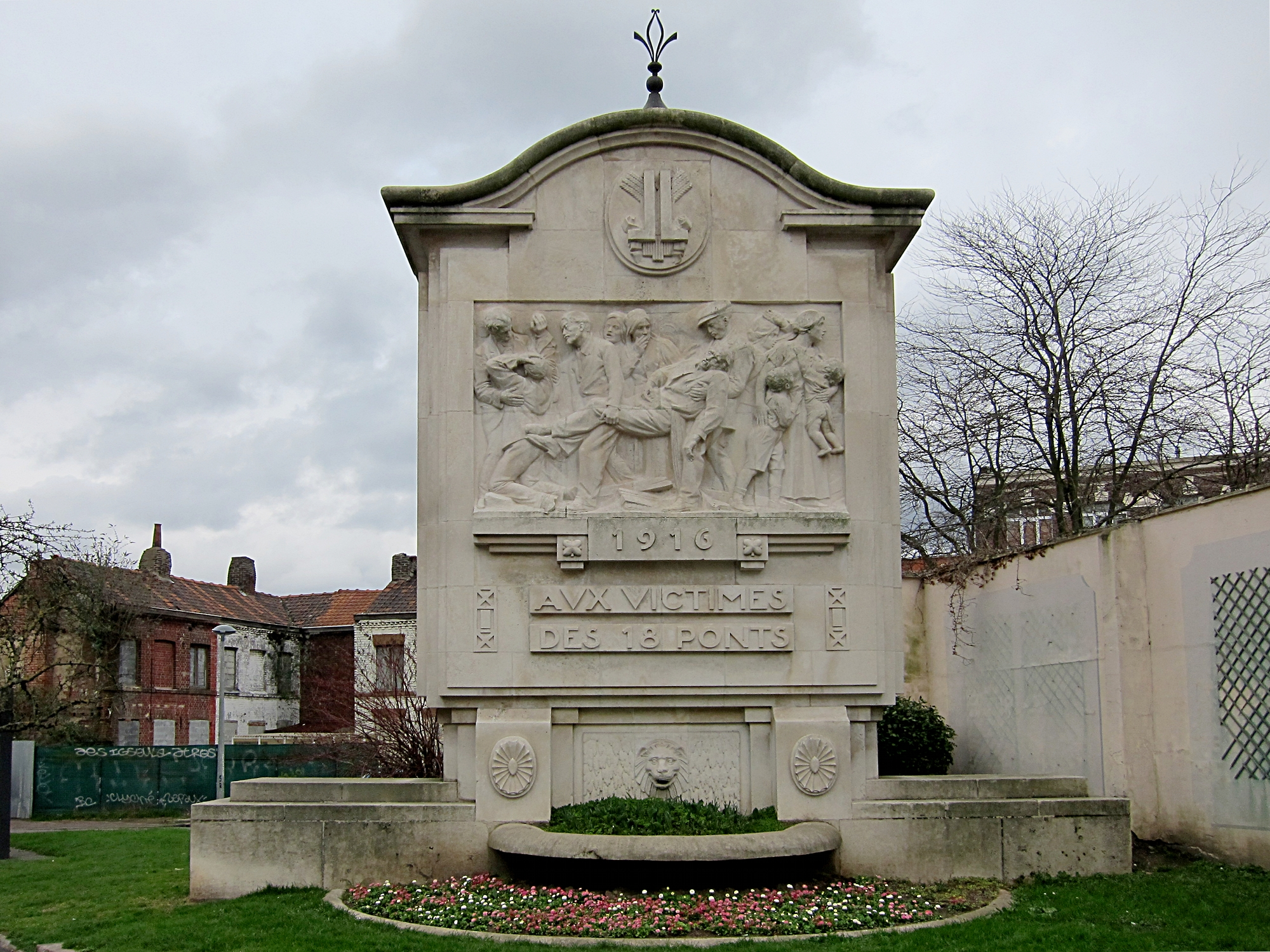 Le monument à la mémoire des victimes de l'explosion du dépôt de munitions des 18 ponts dans le quartier de Moulins à Lille (France, département du Nord).Sculpteur : Edgar Boutry